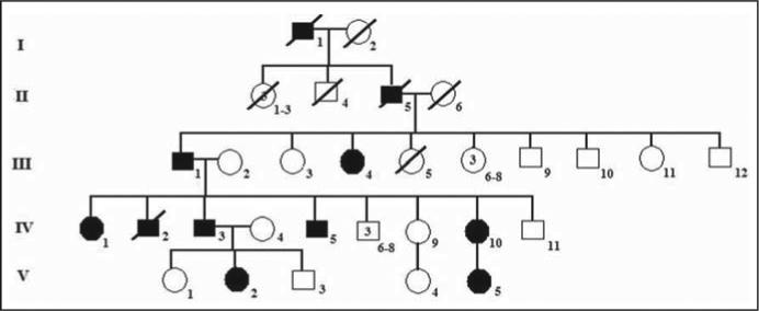 Heredograma da família com membros afetados em diferentes gerações identificando herança autossômica dominante.